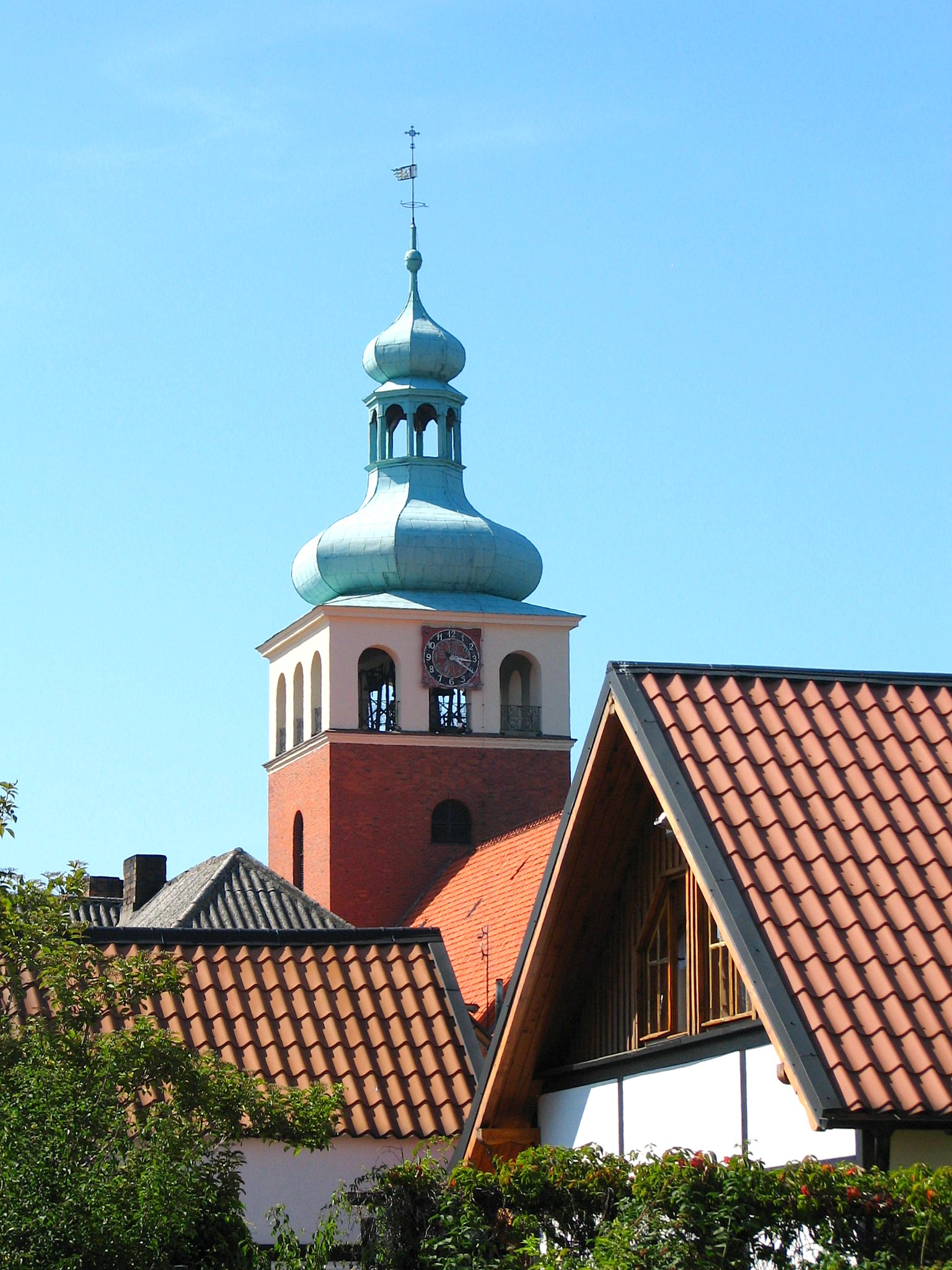 wieża kościoła w Jastarni